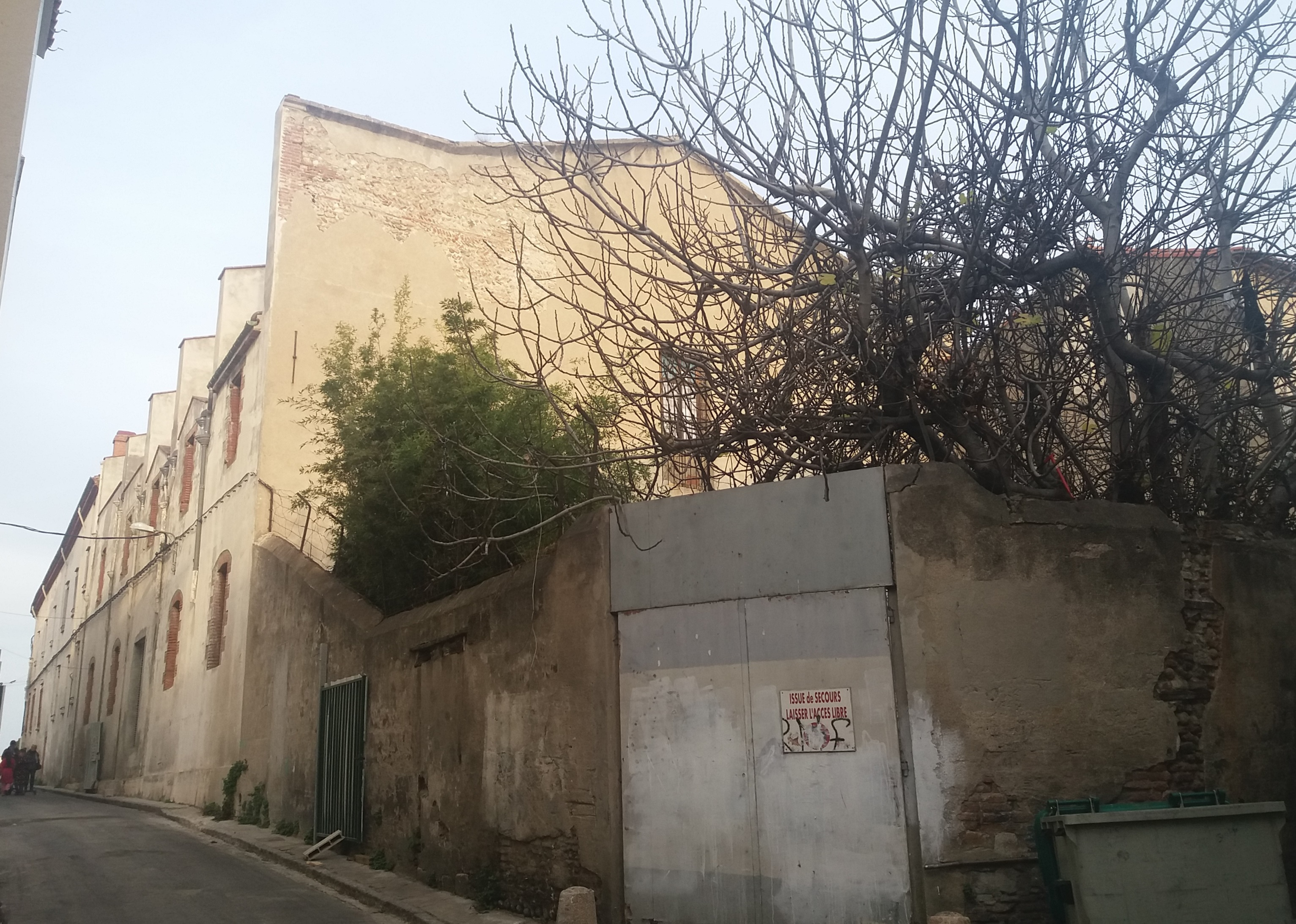 L'església del convent dels Mínims de Perpinyà